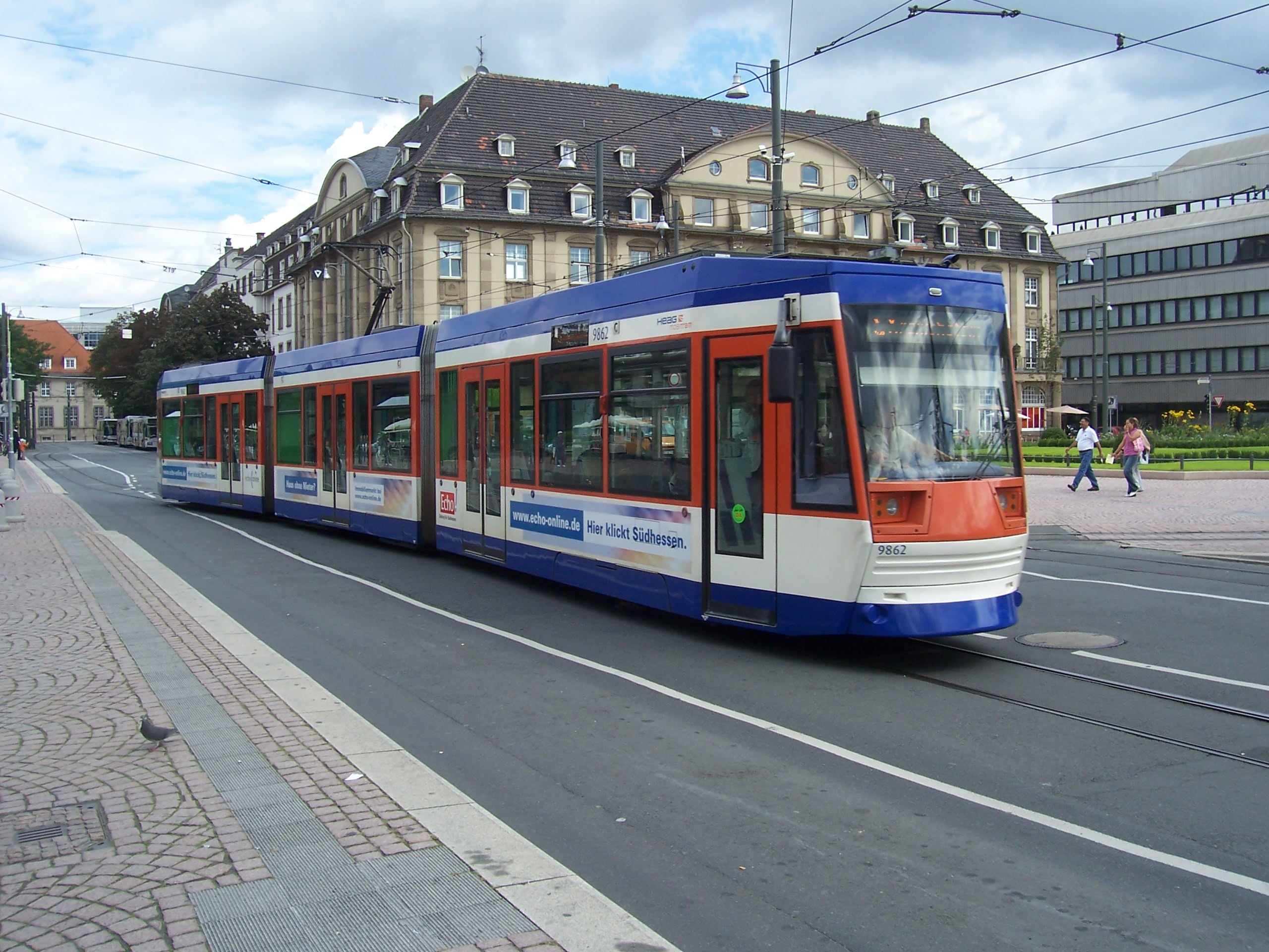 Straßenbahn 9862 der HEAG mobilio in Darmstadt am Hauptbahnhof